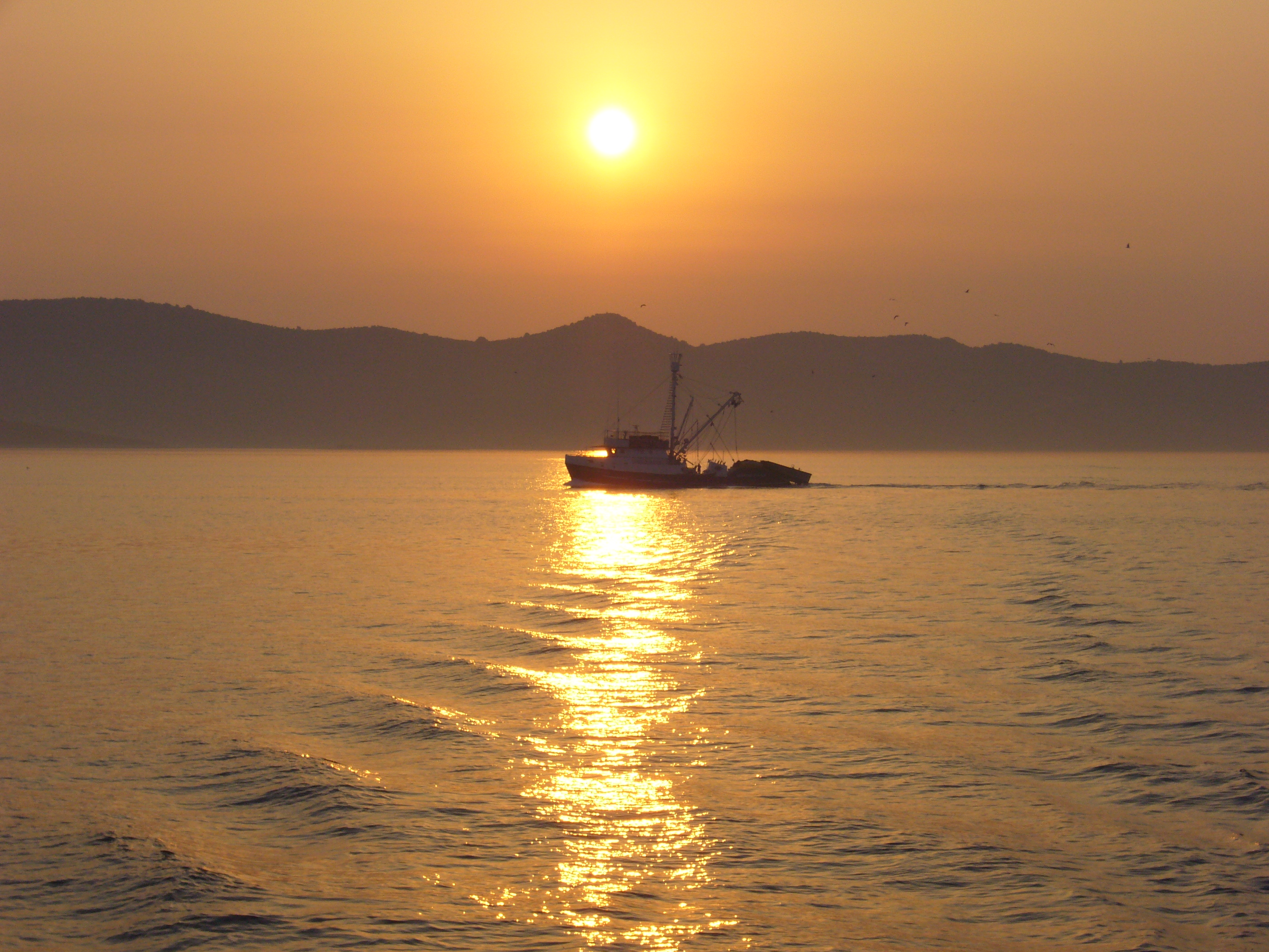 Bateau de pêcheur à l'aube, archipel du parc national des Kornati, Croatie, août 2006 Guilhem Dulous